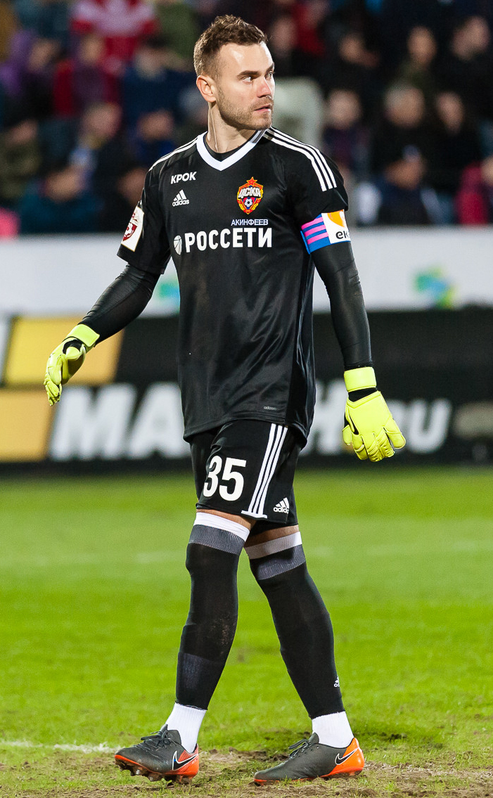 Эксперт Гудьонсен и разочарование Калачева - лучшие кадры матча «Ростов» - ЦСКА